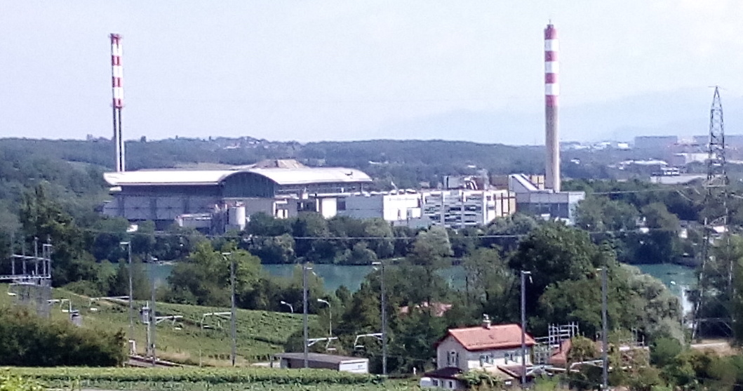 Usine d’incinération des Cheneviers (commune d'Aire-la-Ville), dans le canton de Genève. Photo prise depuis la commune de Russin.